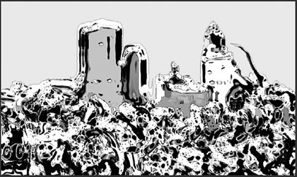 Bilden är tänkt som ett slags technokonstverk